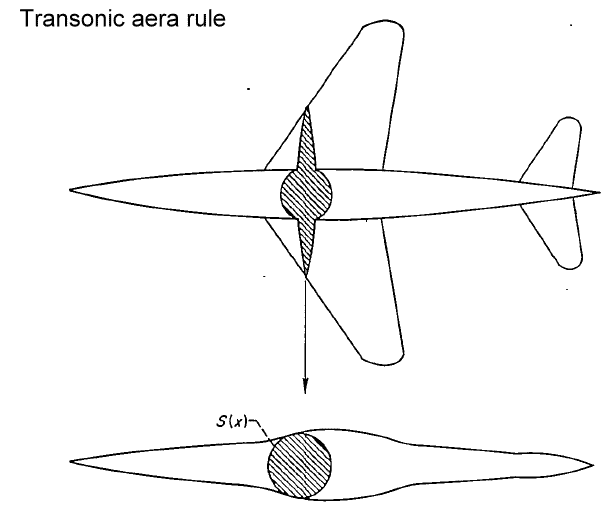 Transonic area rule